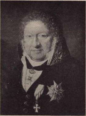 Norwegian: Høyesterettsjustitiarius Johan Randulf Bulltitle QS:P1476,no:"Høyesterettsjustitiarius Johan Randulf Bull" label QS:Lno,"Høyesterettsjustitiarius Johan Randulf Bull"